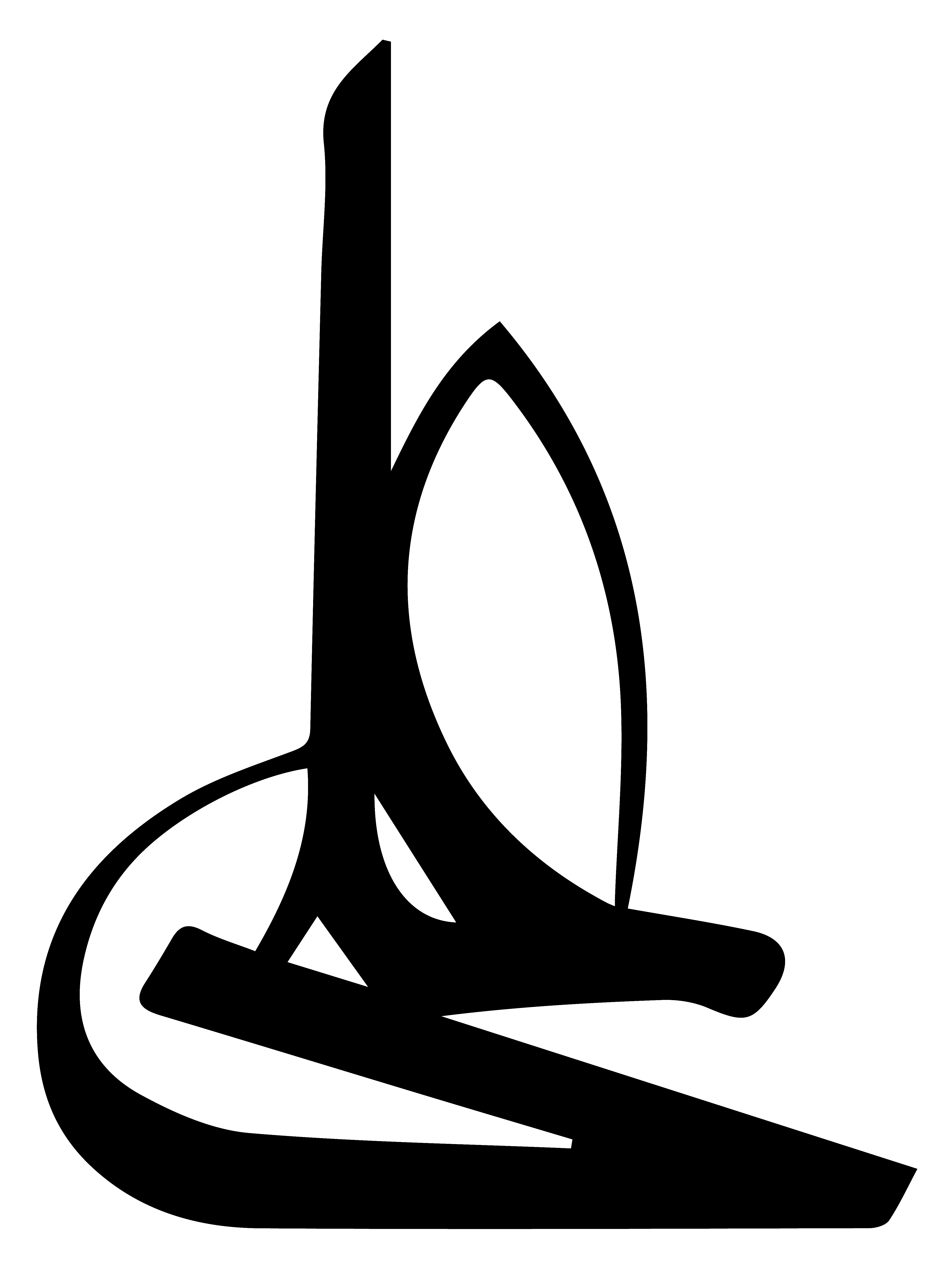 خوشنویسی نام «علی» به خط معلی